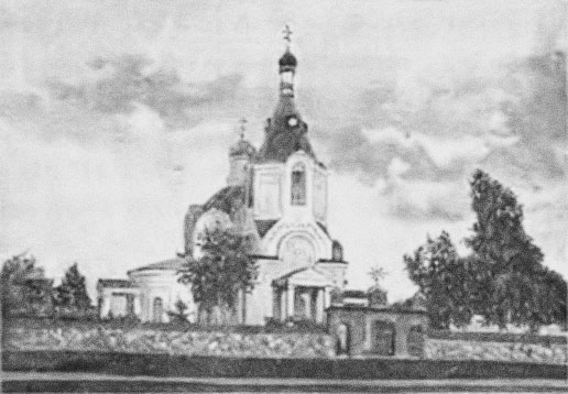 Беларуская (тарашкевіца): Даўгінаў (Daŭhinaŭ). Траецкая царква мураўёўка